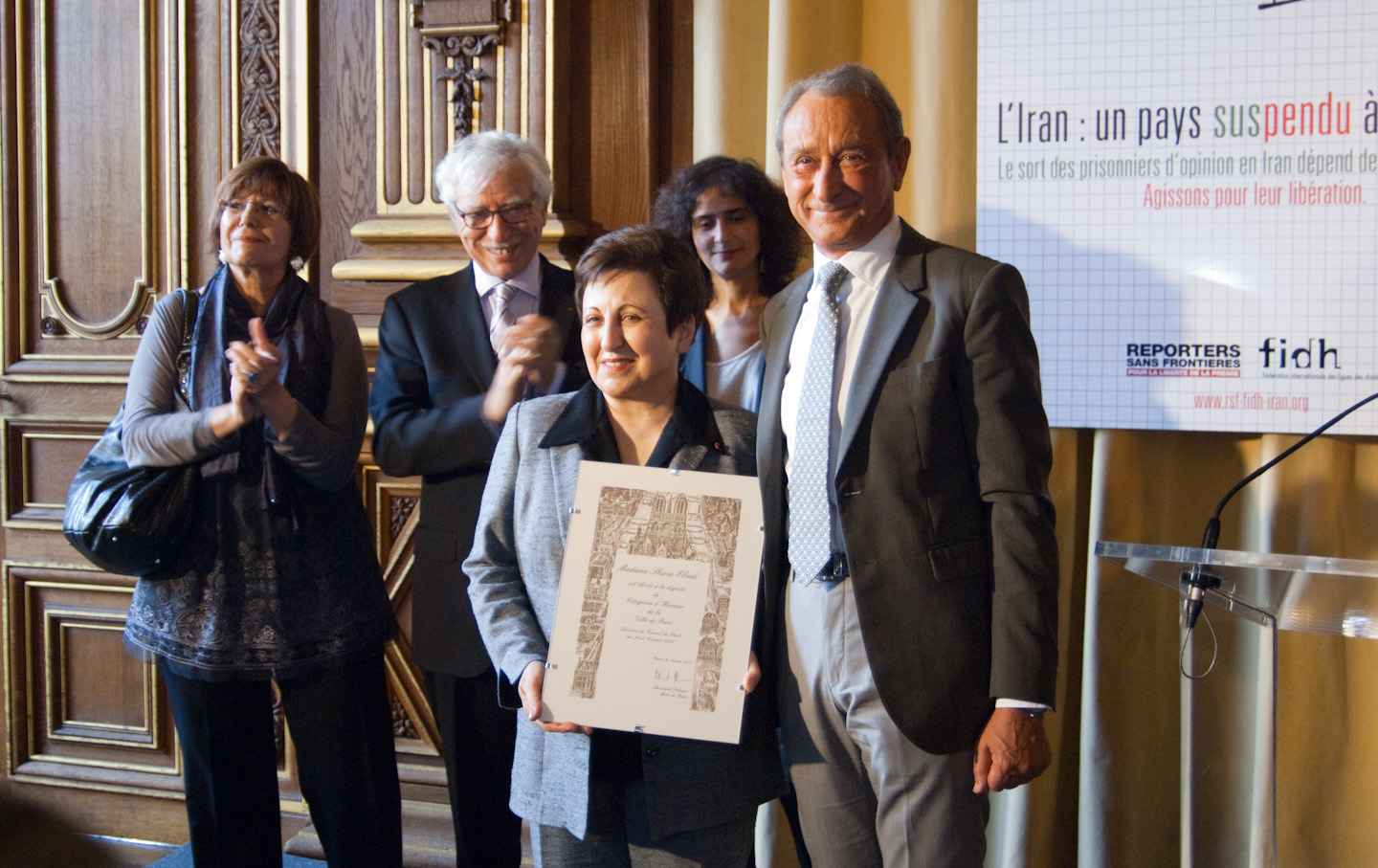 Shirin Ebadi Citoyenne d'honneur de la Ville de Paris شيرين عبادي أثناء حصولها على وسام المواطن الفخري بباريس